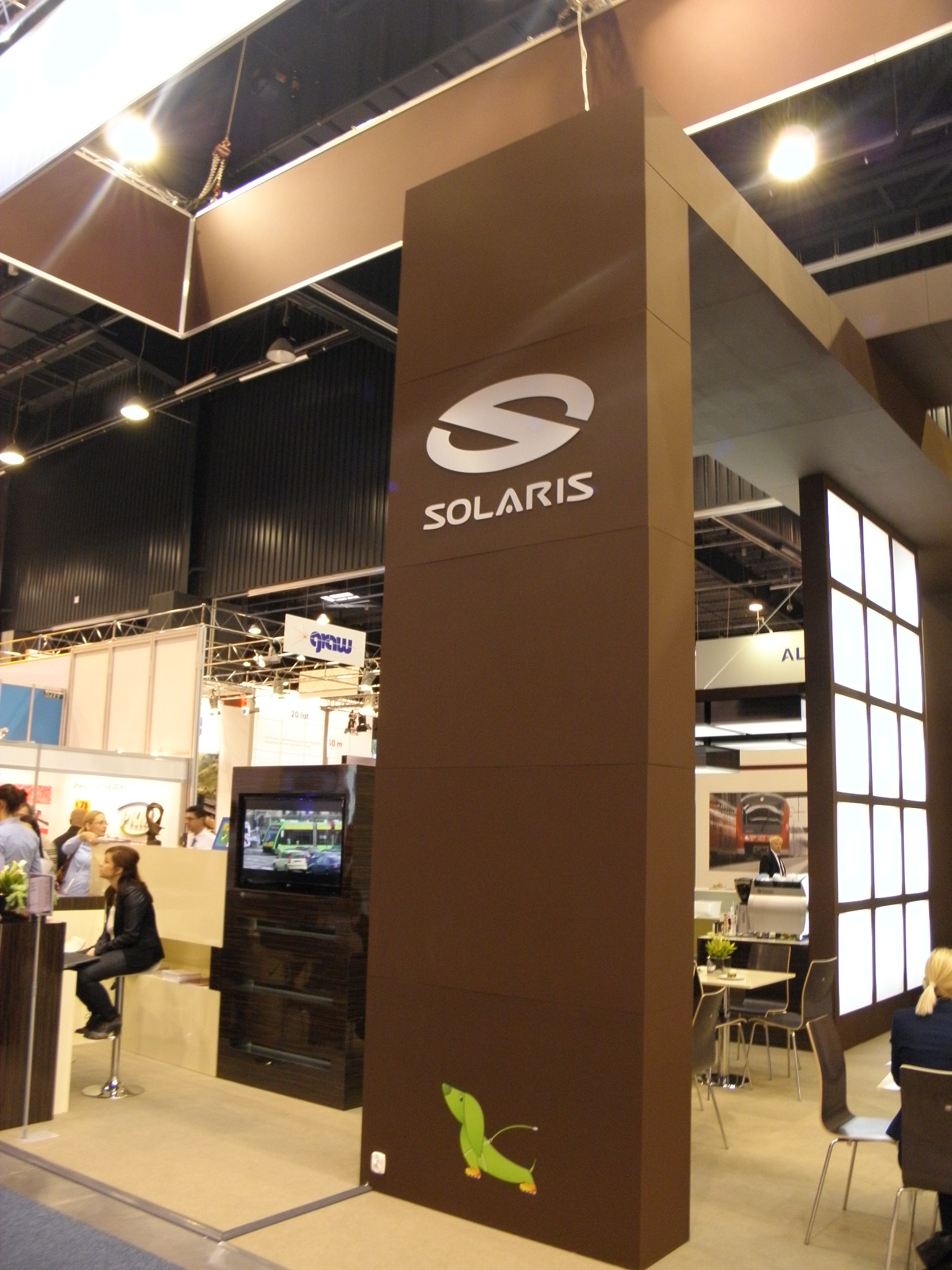 Photo from Trako 2013, Gdańsk/Danzig